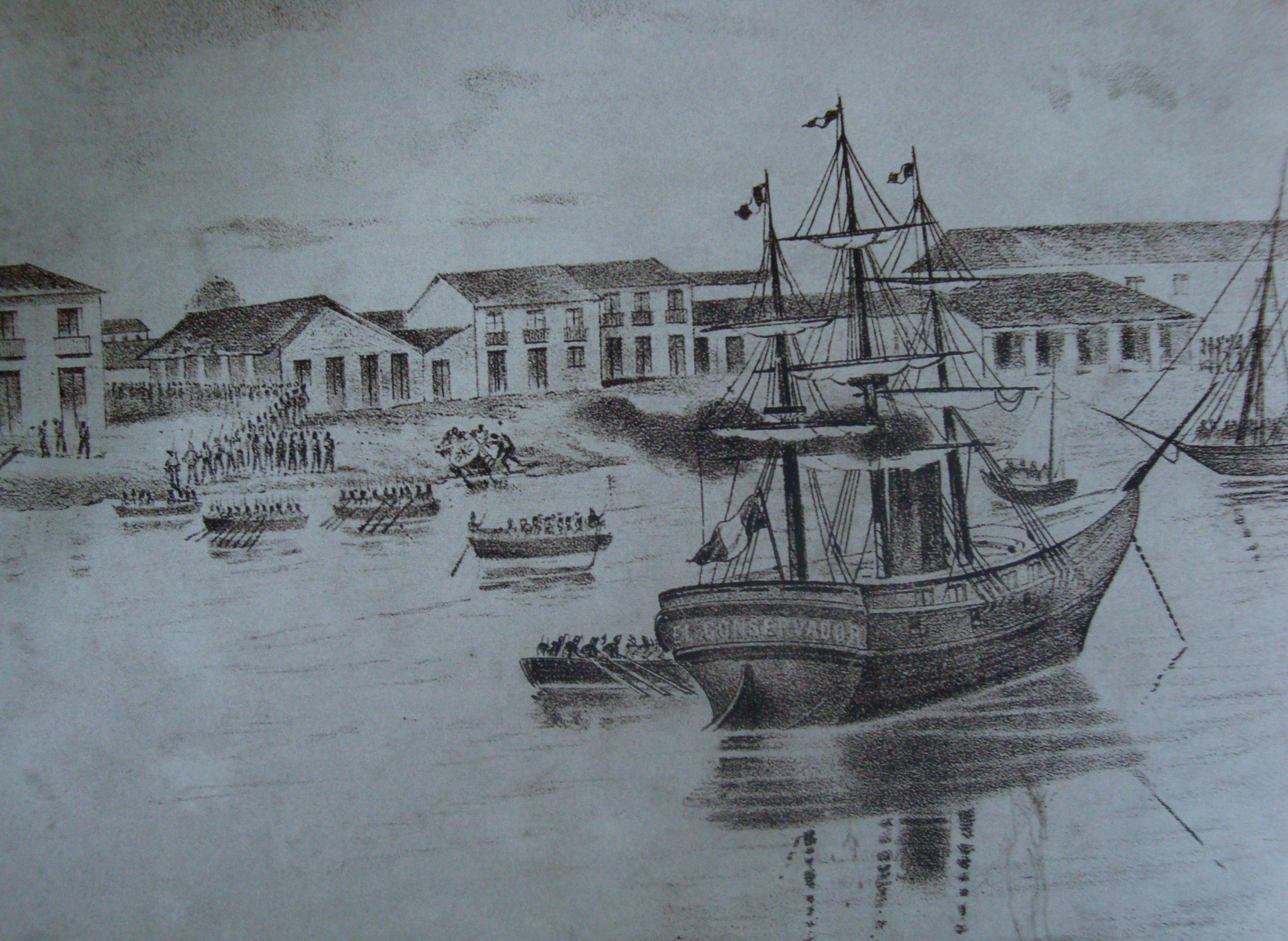 Retirada de las fuerzas intervencionistas francesas de San Juan Bautista, capital del estado mexicano de Tabasco, después de ser derrotadas por el Ejército Liberal Tabasqueño el 27 de febrero de 1864.